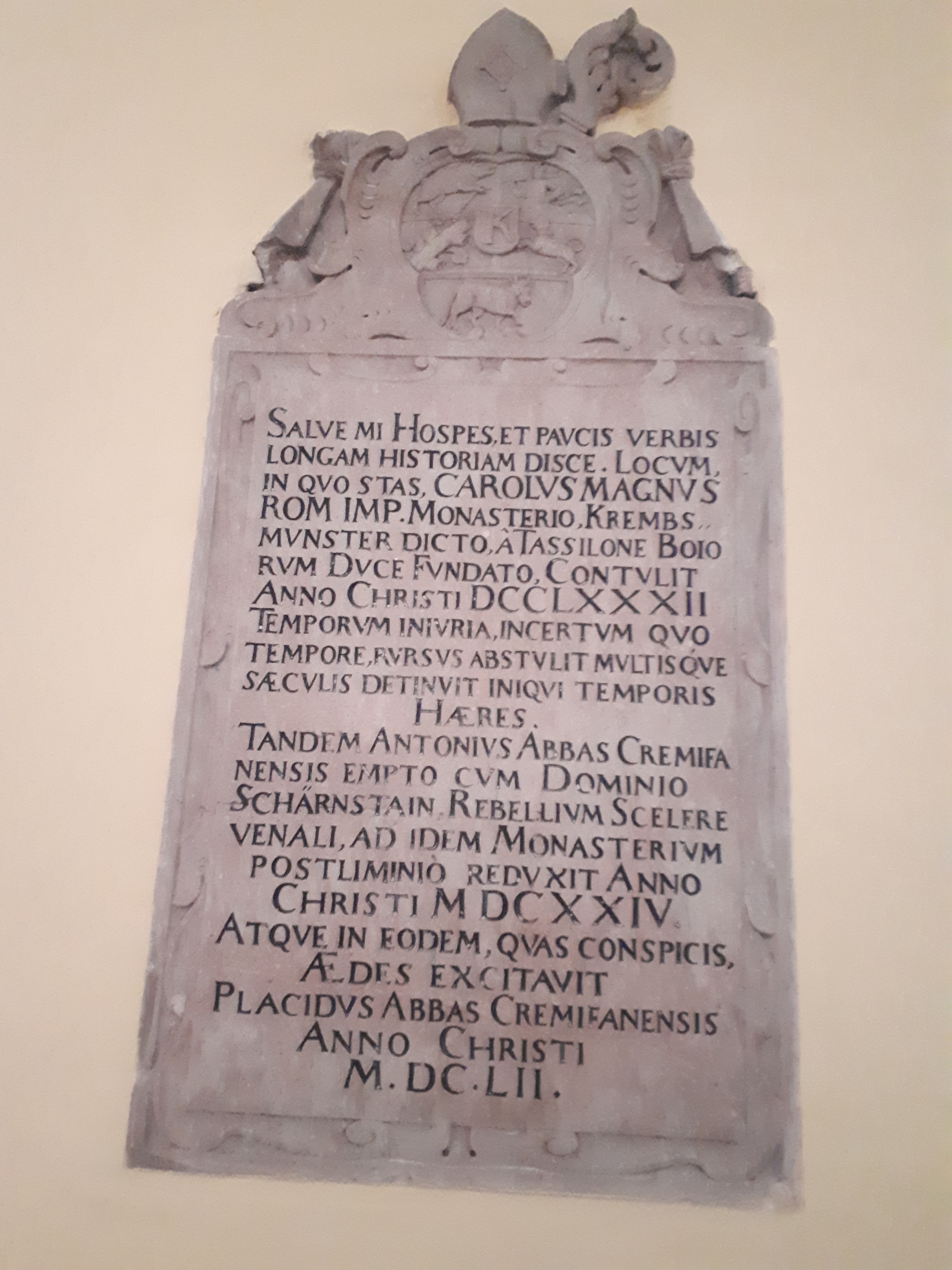 Placidus Buechauer (1610 o.1611 - 1669), Abt von Stift Kremsmünster (Öberösterreich) (1644-1619) ließ 1652 am Südende des Almssee das Seehaus errichten. Das Kloster betrieb und betreibt dort Forst- und Fischwirtschaft. Die Gedenkplatte ist in der Kapelle des Hauses (öffentlich zugänglich, Panoramafreiheit) angebracht zur Erinnerung an die Errichtung des Hauses. Inschrift: "Sei gegrüßt, o Gast, und lerne in wenigen Worten eine lange Geschichte: Den Ort, an dem du stehst, hat Karl der Große, Römischer Kaiser, dem Kloster, das Kremsmünster genannt wird, das von Tassilo, dem Herzog der Baiern gegründet wurde, zugefügt, im Jahr des Herrn 782. ..."